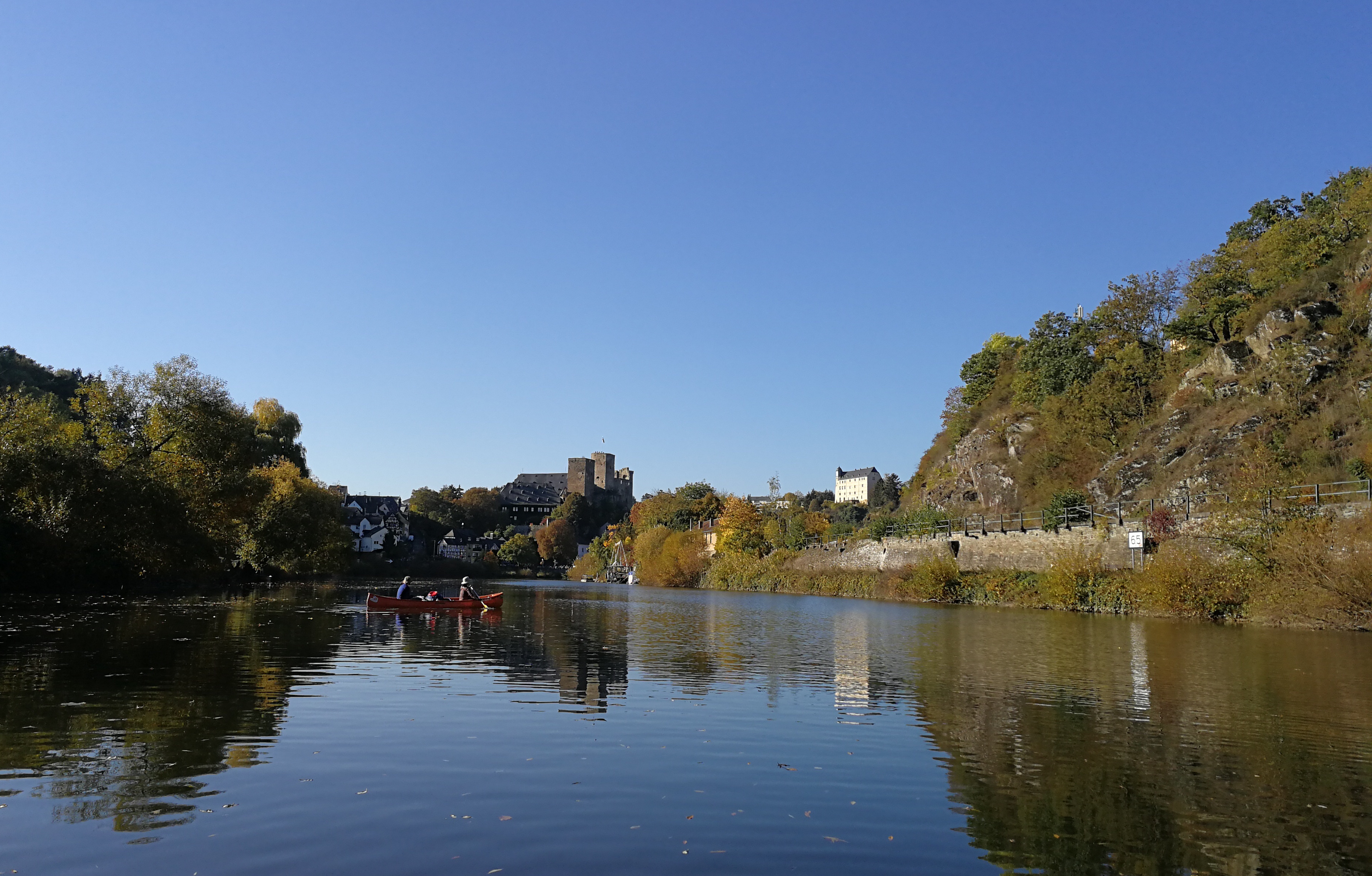 Die Ruine der Burg Runkel am linken und die Trutzburg Schloß Schadeck am rechten Lahnufer (Runkel, Hessen; Ansicht von SSO)